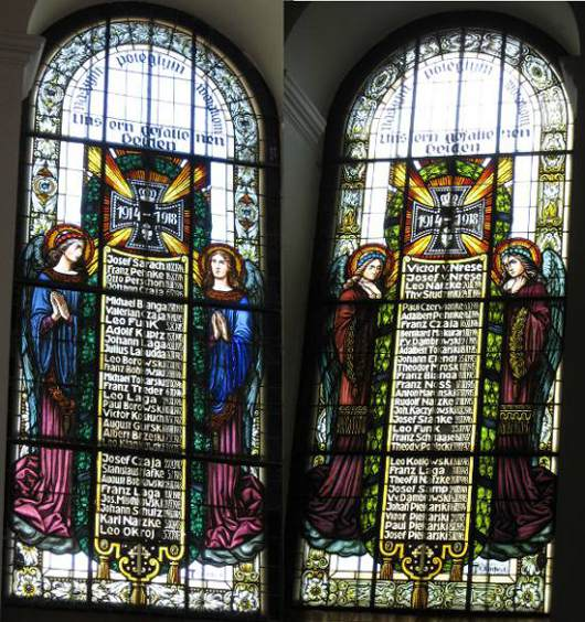 Witraże w prezbiterium kościoła w Rozlazino